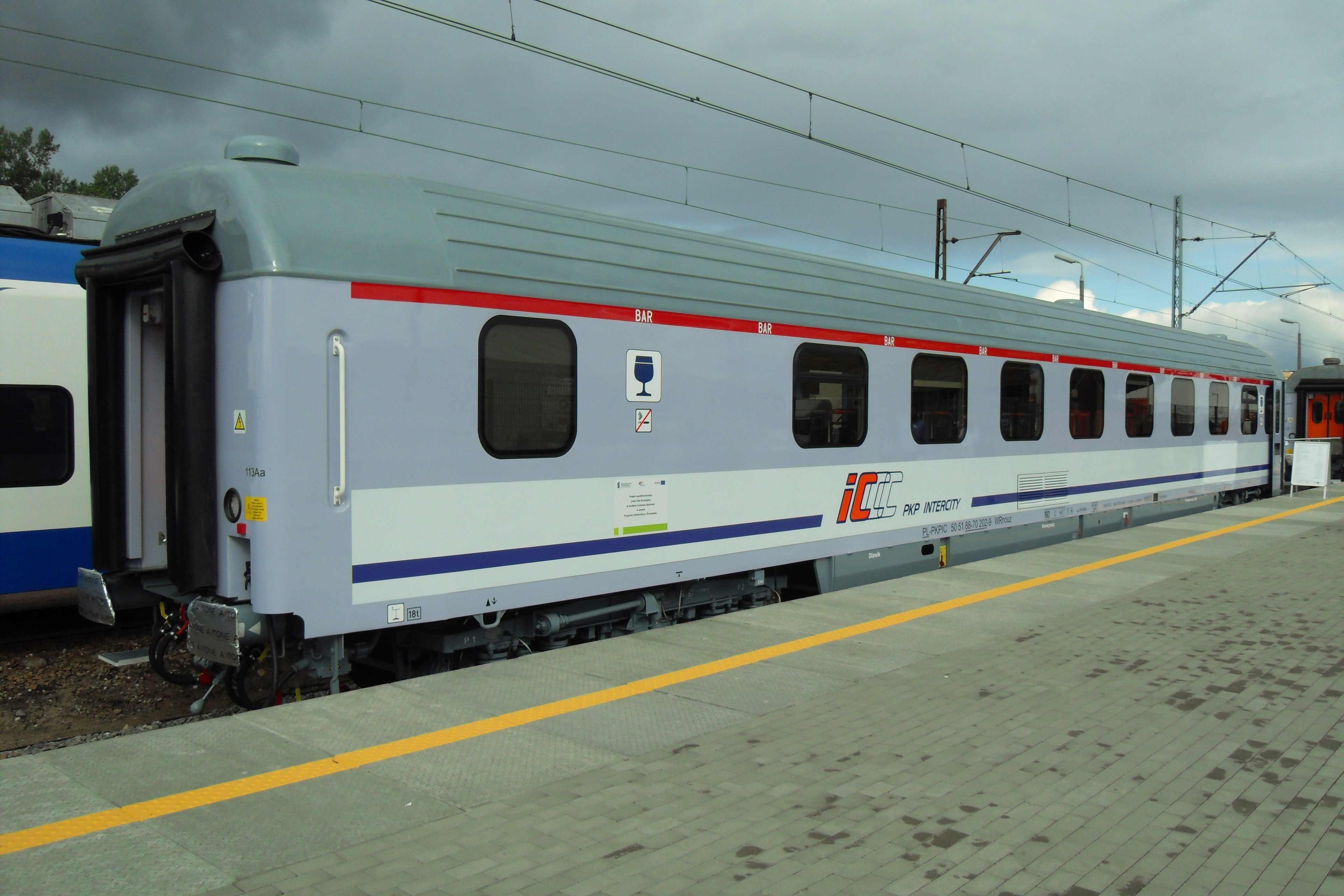 Gdańsk Letnica. TRAKO 2013, wagon 113Aa (modernizacja Pesa).